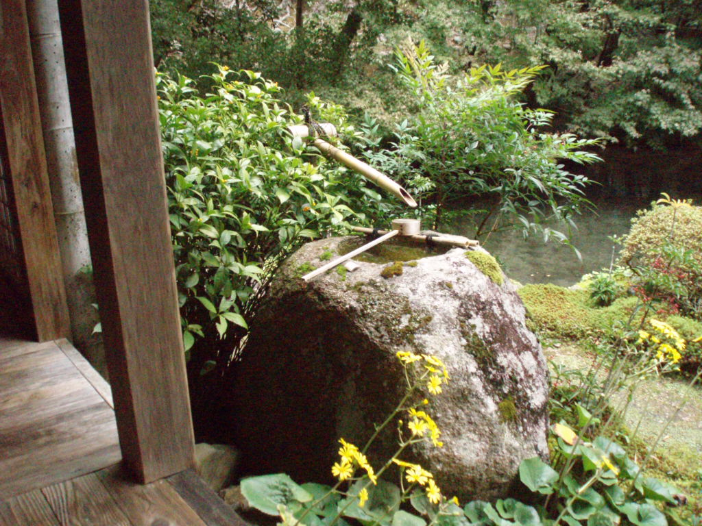 蓮華寺庭園のつくばい